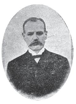 Коне Самарджиев.